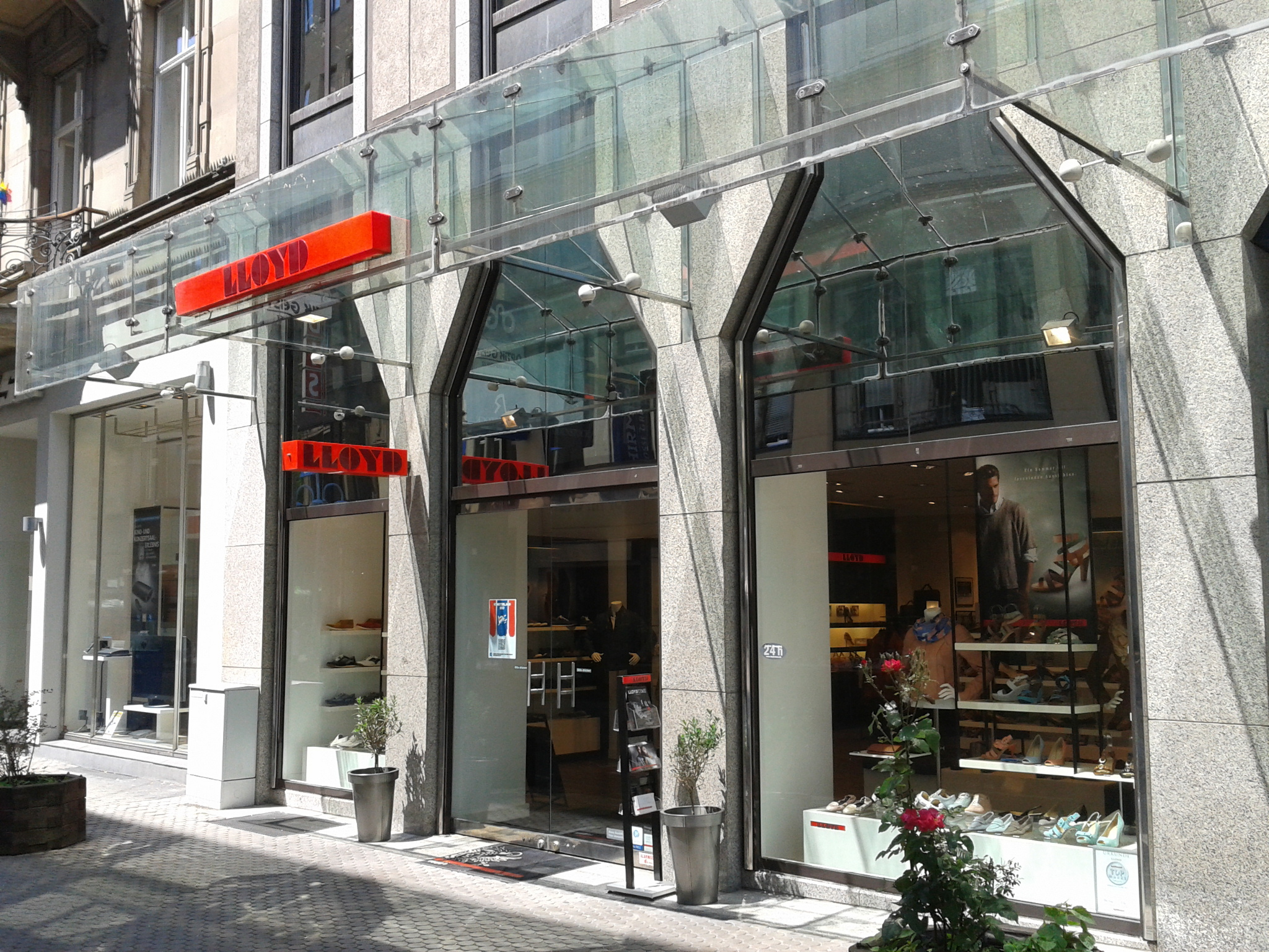 Lloyd Concept Store in Mannheim, O6, 7, gegenüber O7